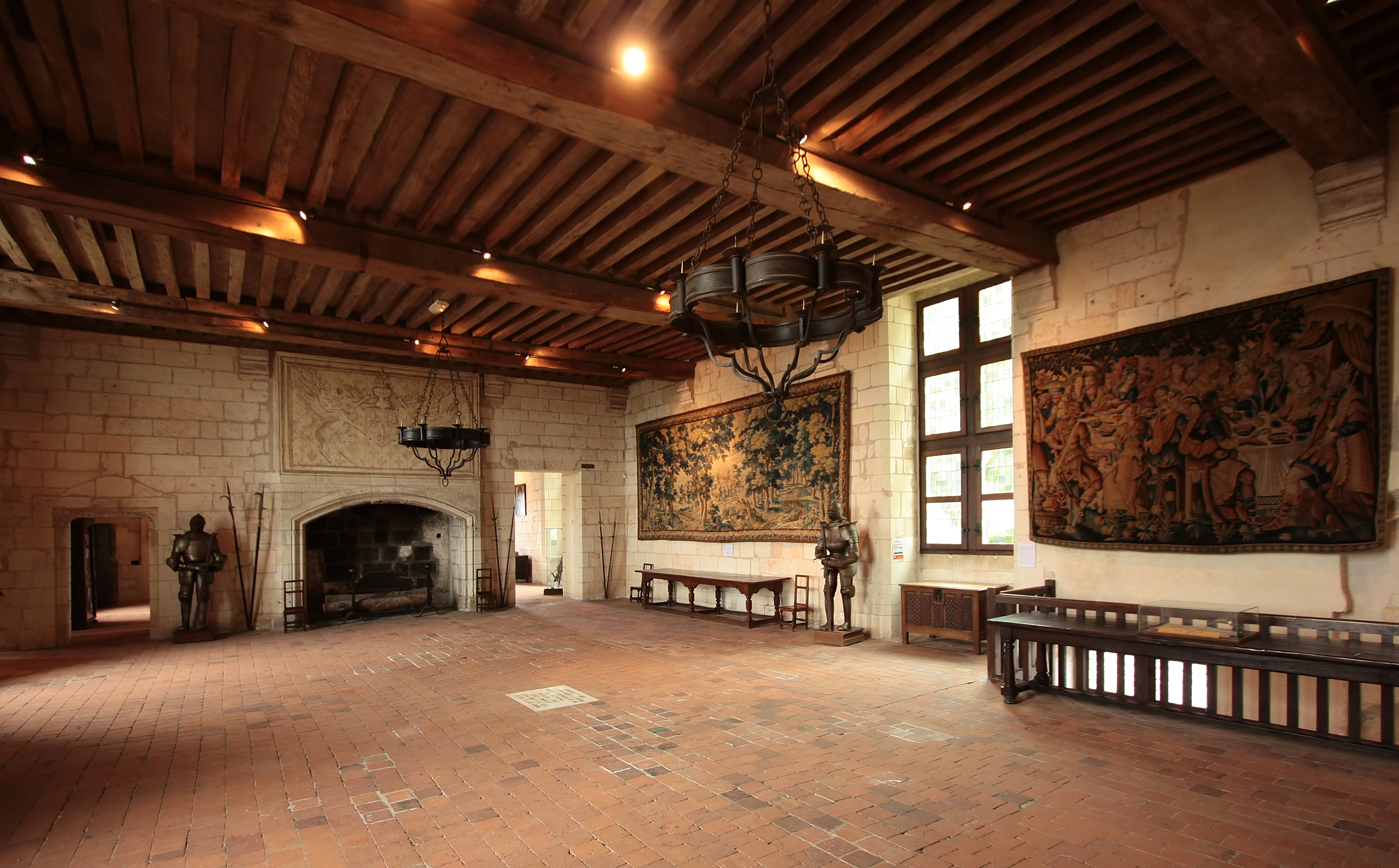 Schloss Loches in Loches/Frankreich - Der Saal der Jeanne d'Arc